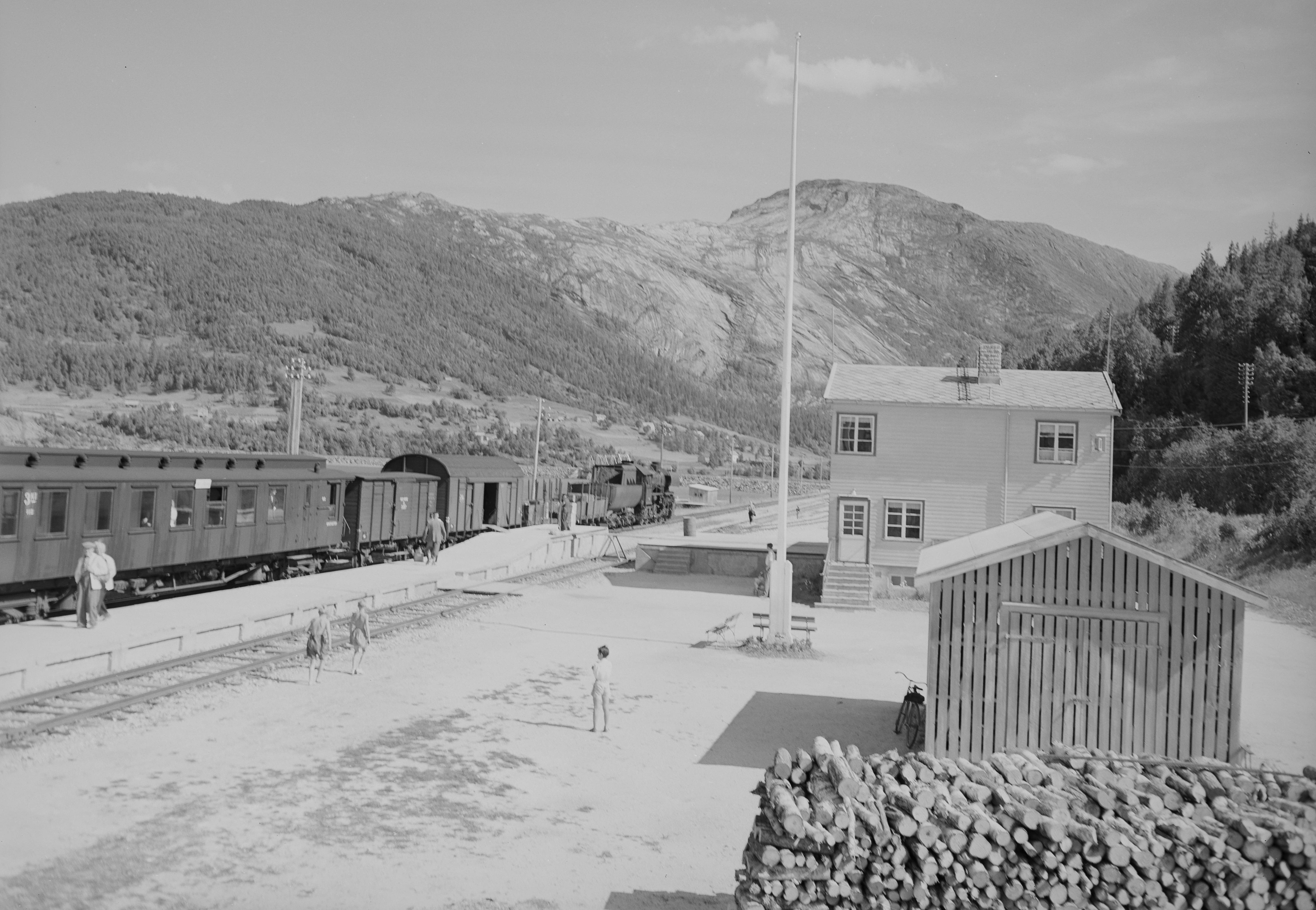 Dalselv stasjon på Nordlandsbanen. Foto: Mittet & Co.